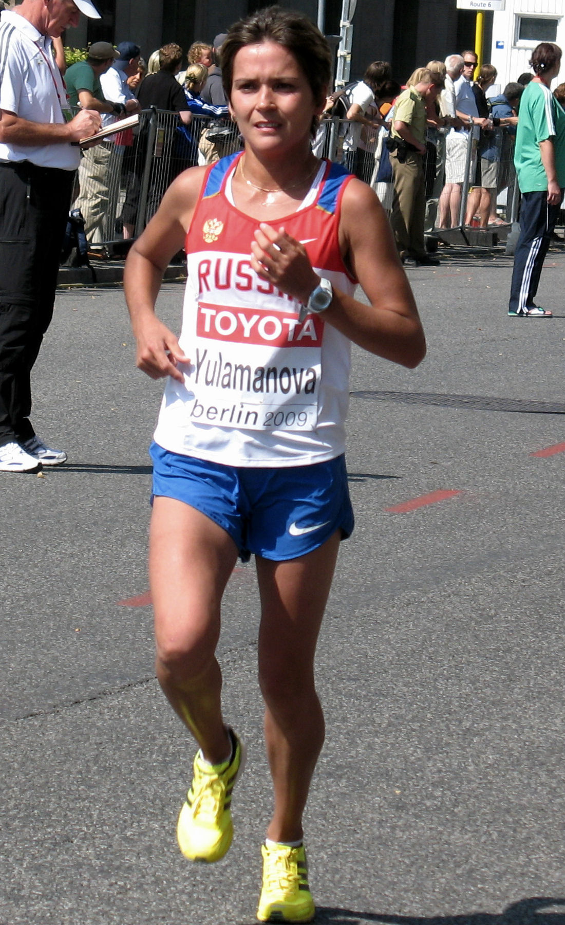 Nailja Gajnulowna Julamanowa in Berlin, 23.08.2009